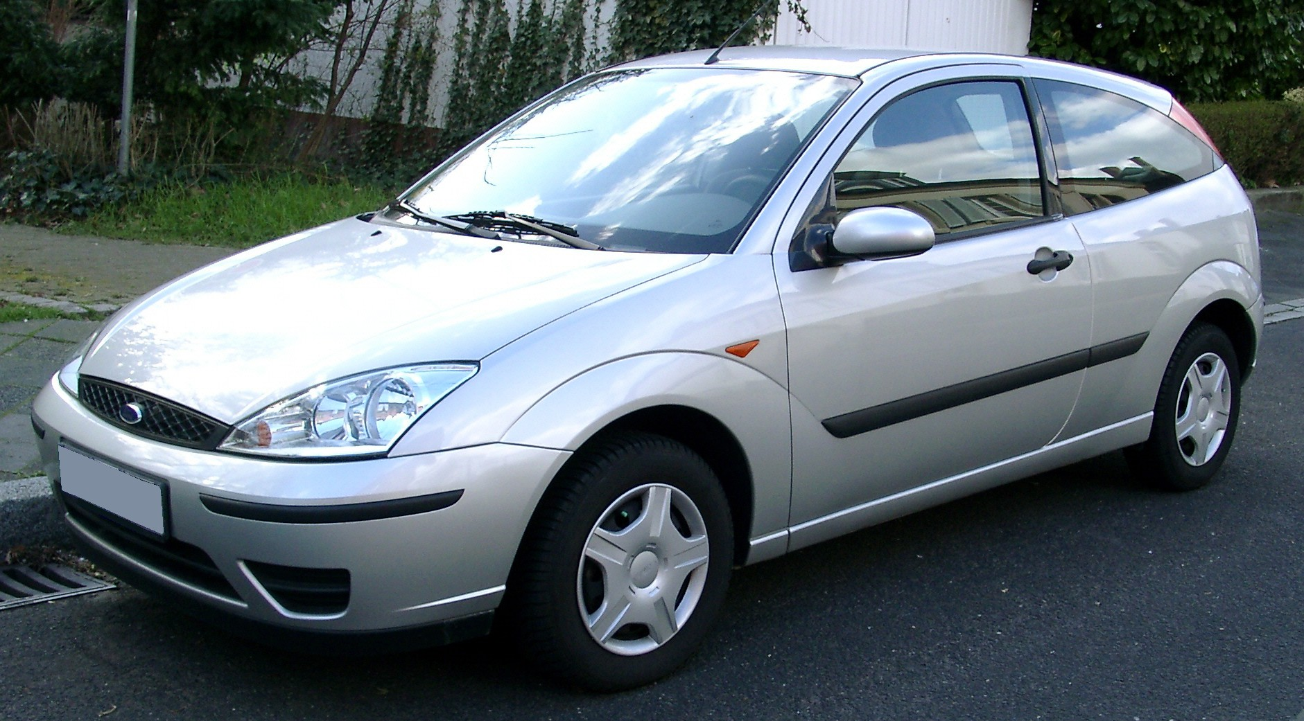 Ford Focus